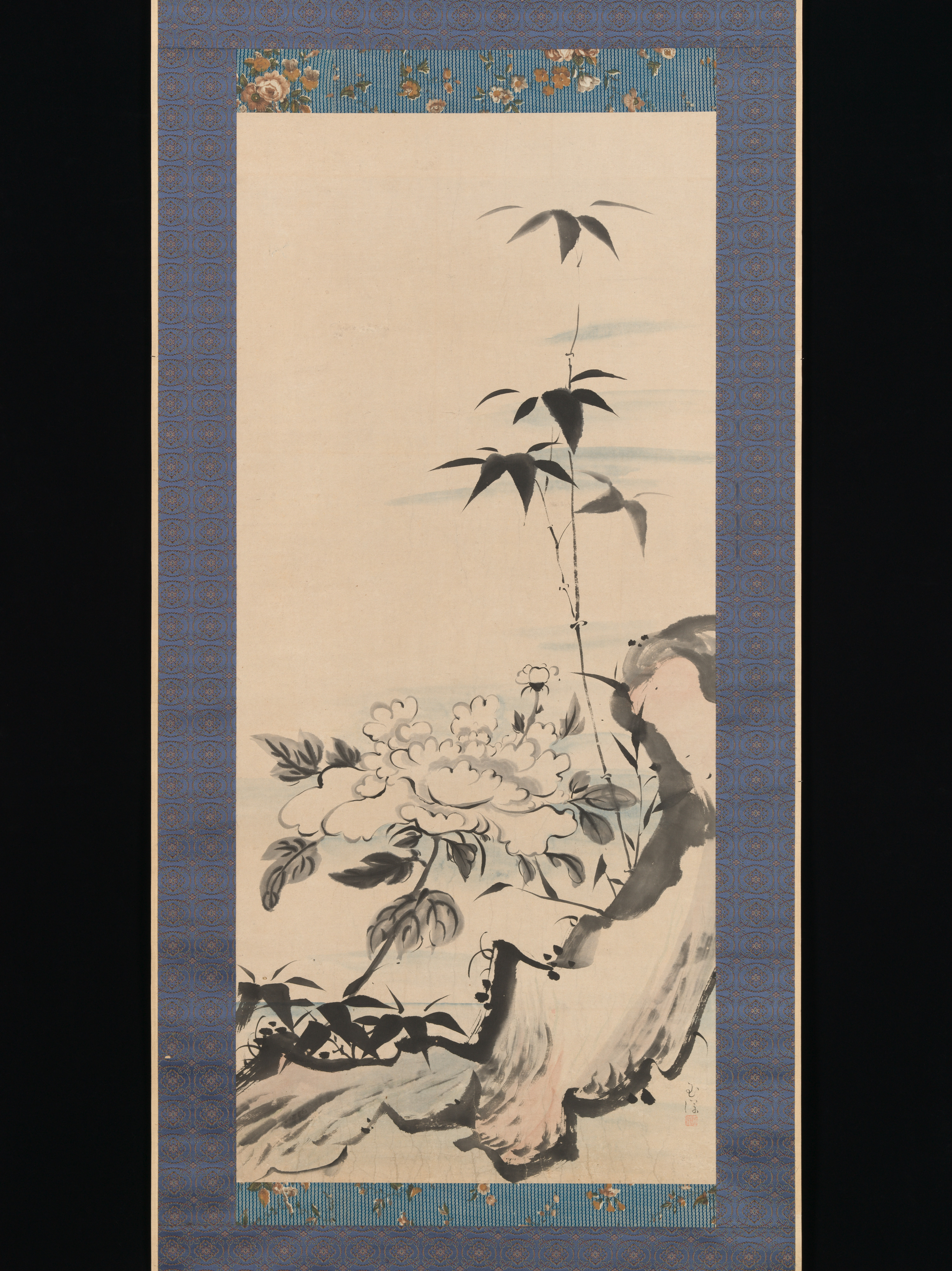 Japan; Hanging scroll; Paintings